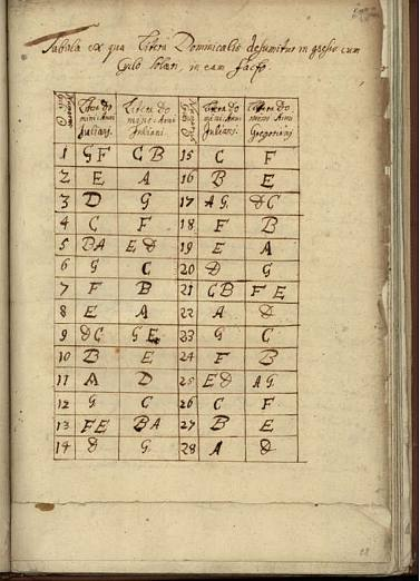 Sluneční kruh s nedělními písmeny v popisu Staroměstského orloje v Praze od Jana Táborského z Klokotné Hory.